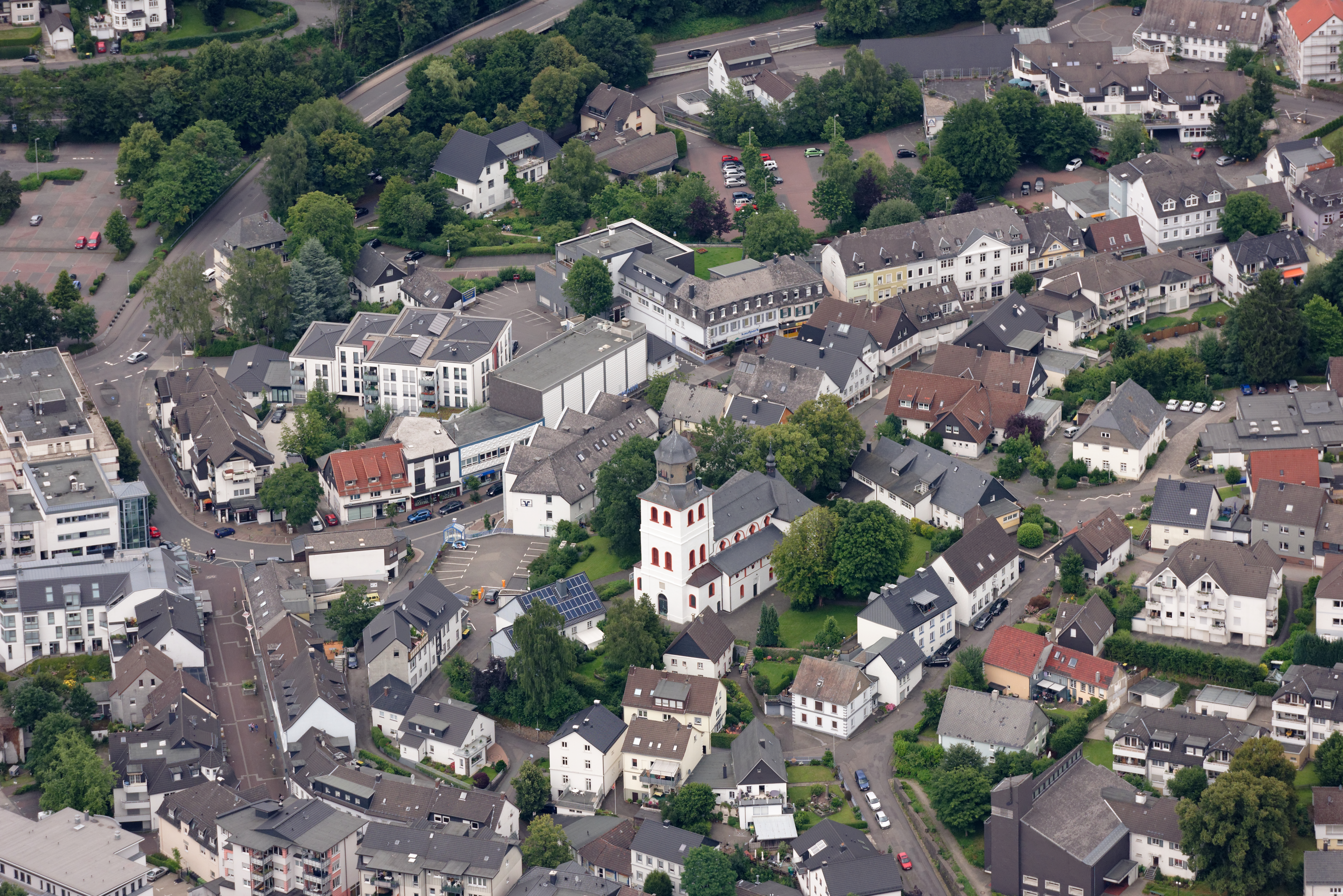 Luftaufnahme: Meinerzhagener Ortstkern mit Jesus-Christus-Kirche, Nordrhein-Westfalen